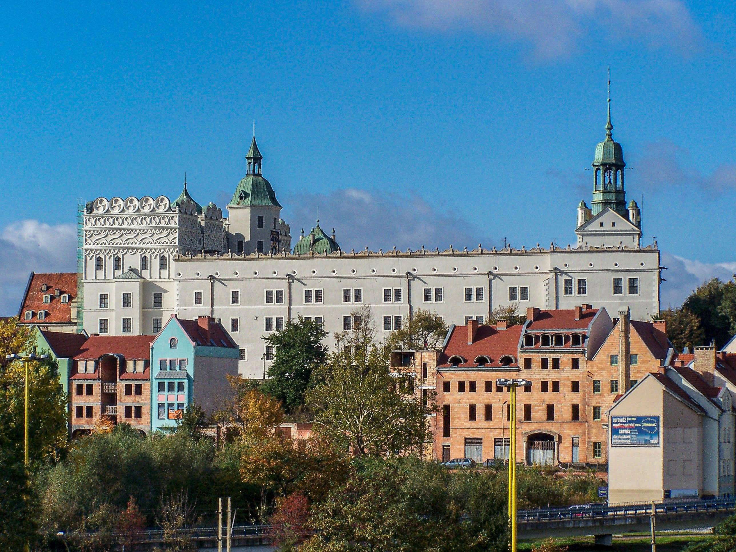 Zamek Książąt Pomorskich, fasada wschodnia